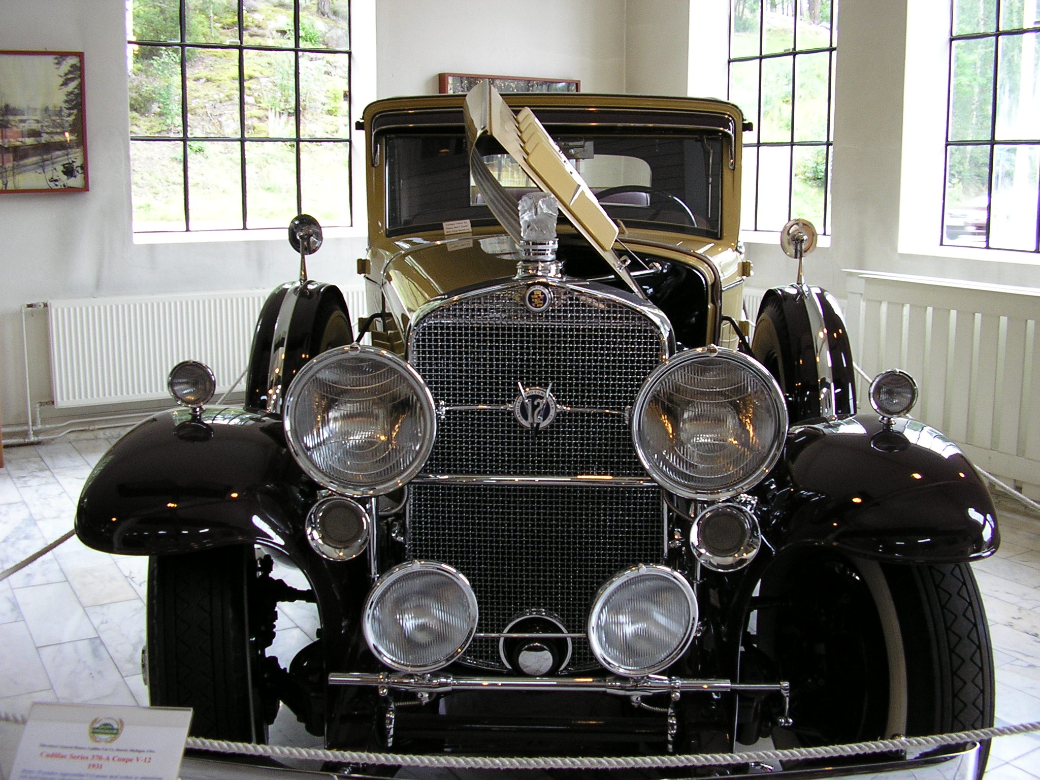 1931 Cadillac Series 370 A Coupé V12